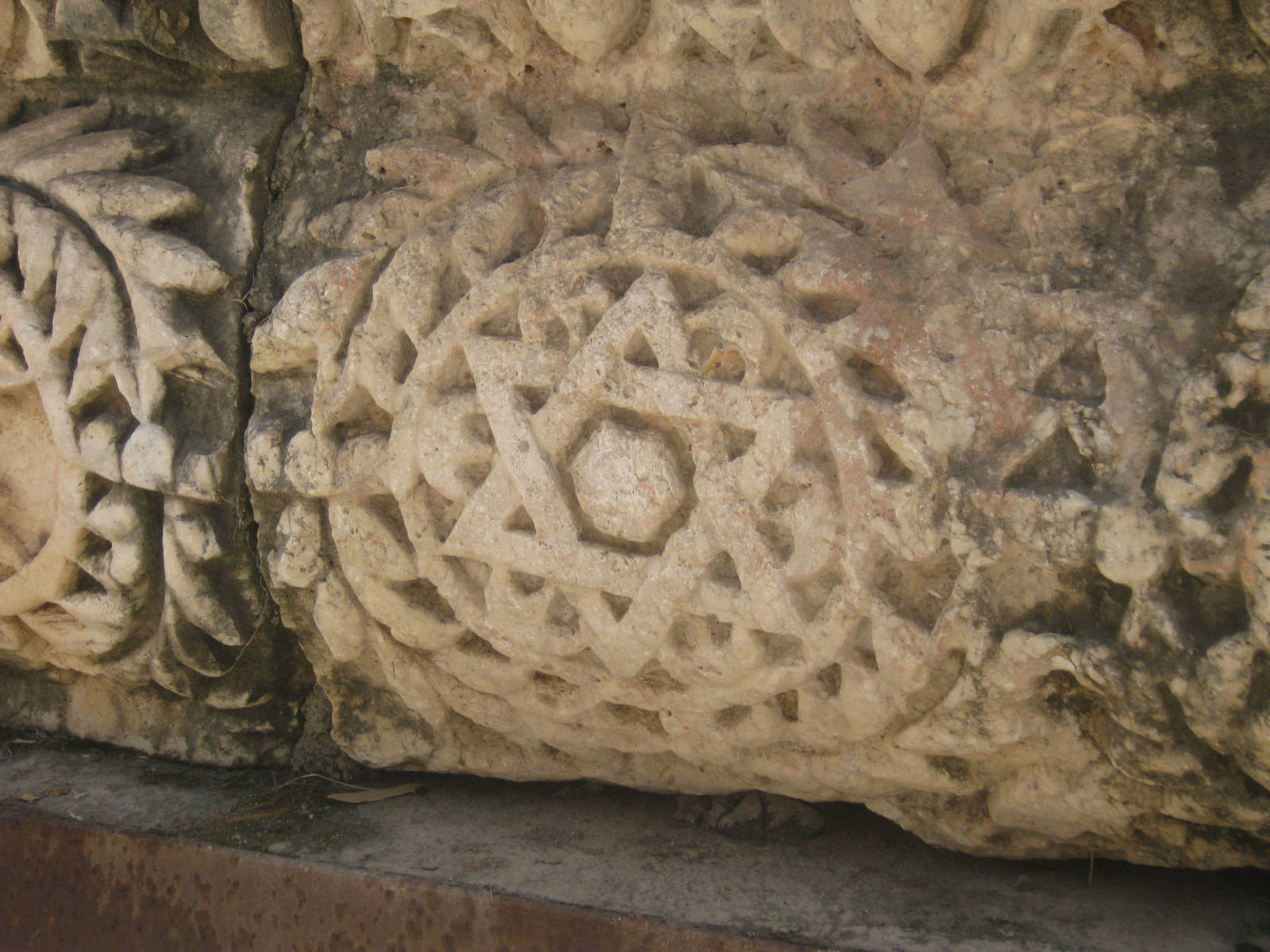 Cafarnaum, Capernaum